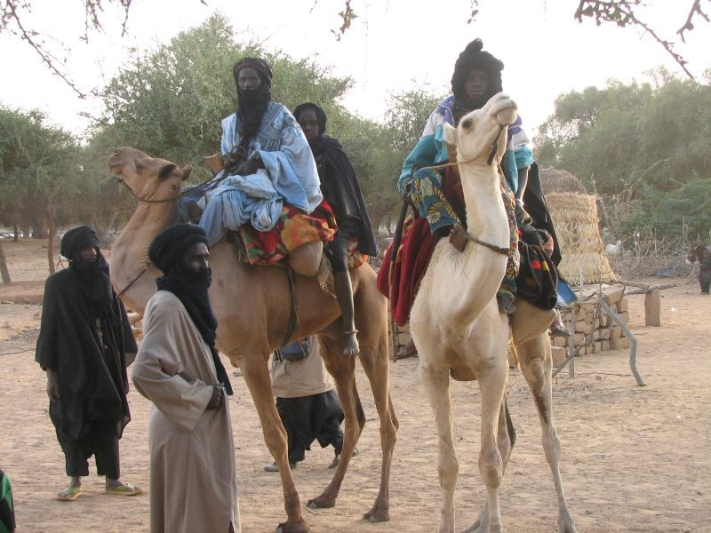 Inates camels